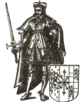 De afbeelding komt uit het boek Stam-Buch der hochgebornen und beruhmten Grafen und durchleuchtigen Hertzogen. (in 1677 gedrukt in Arnhem) De afbeelding stamt dus ook uit die tijd. De tekenaar is mij helaas onbekend.